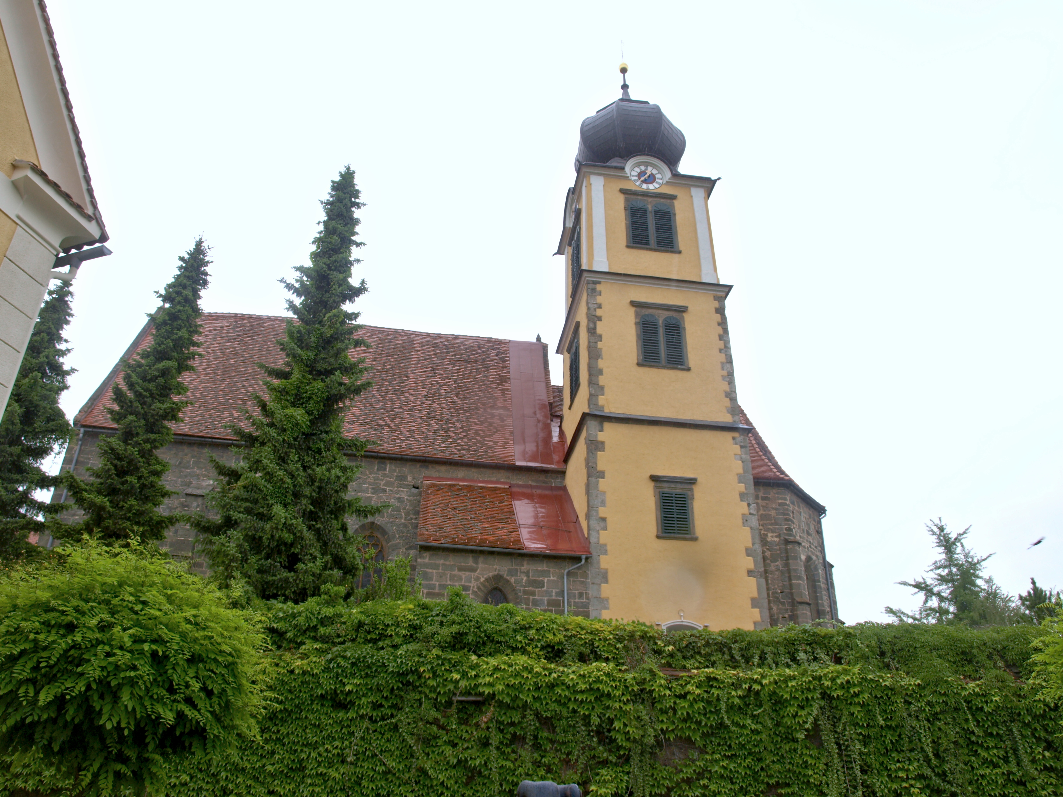 Kath. Pfarrkirche hl. Martin